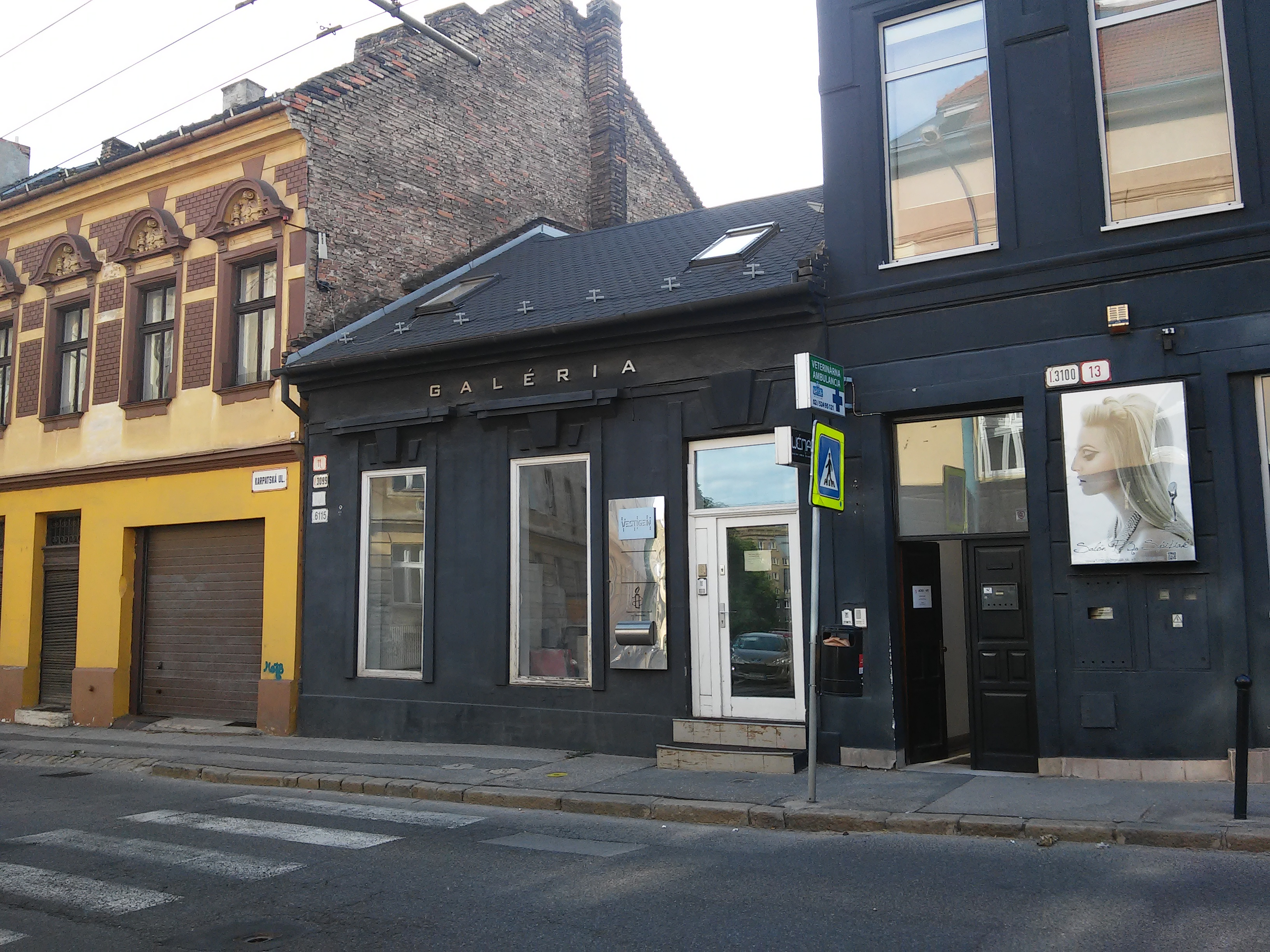 Vila K.F.A. na Karpatskej ulici v Bratislave